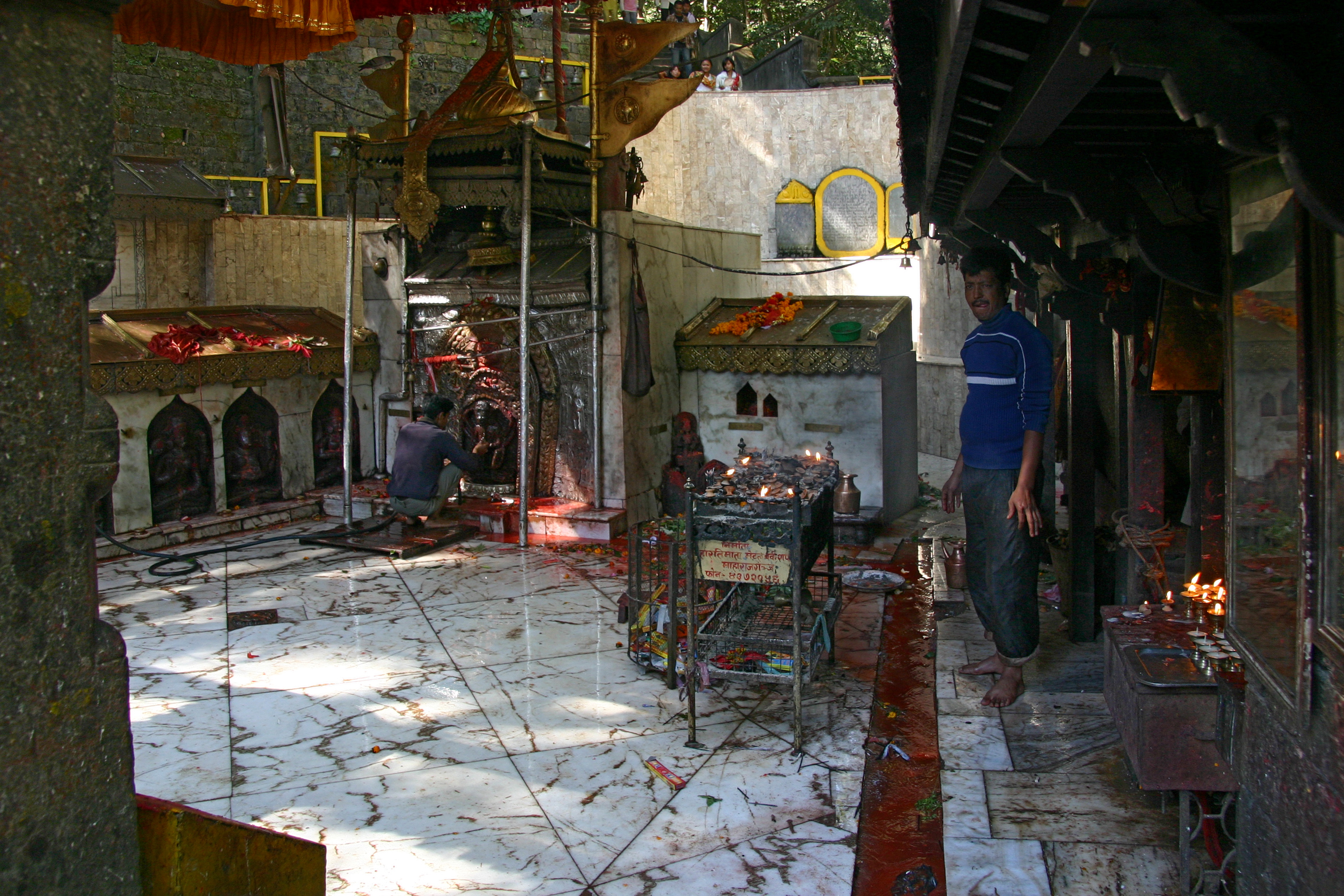 Dakshinkali, Opferschrein.